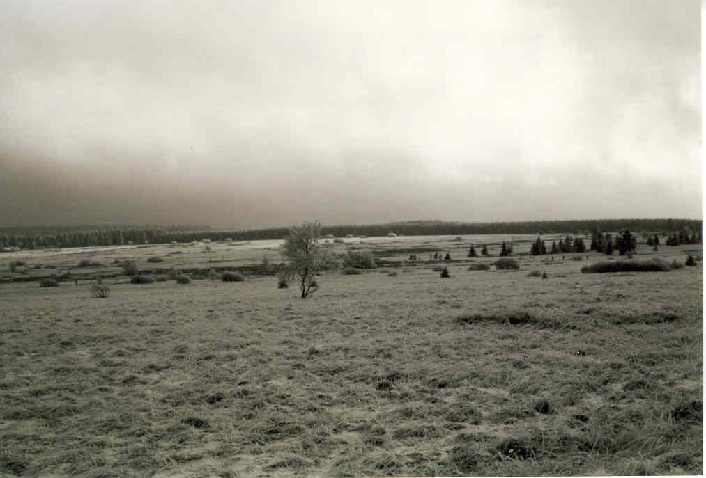 Typische Landschaft des Hohes Venn, eigenes Bild